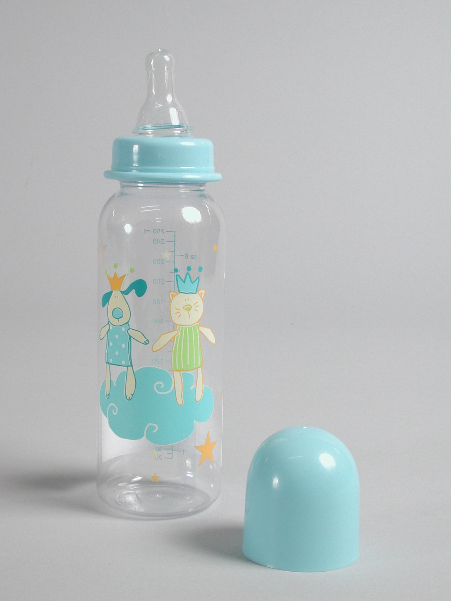 Objectgegevens Titel: Transparante kunststof zuigfles met blauwe dop en siliconen speen, antilekplaatje en schroefbevestiging Beschrijving: Transparante zuigfles met blauwe dop en siliconen speen. De speen wordt met schroefbevestiging vastgezet, het kunststof plaatje dient als antilekmiddel. De fles is voorzien van schaalverdeling 250 ml en is versierd met gestileerde hond en kat. Deze dieren zijn gekleed en dragen een kroon op het hoofd. Op de fles zit een etiket van de HEMA met streepjescode, productnummer en de vermelding dat de fles zonder dop en speen in de magnetron mag. Trefwoorden: zuigfles, eetgerei, uitrusting Opschrift / merk: Schaalverdeling 250 ml. Etiket: "HEMA mag zonder dop en speen in de magnetron". Datering: 2006 Materiaal: kunststof Afmetingen: (cm) hg 20,0 / dm bodem 5,5 Associatie: baby, kind, eten, voeding, Dick Bruna, konijn, bal, strand Inventarisnr: Museum Rotterdam 83556-A-E